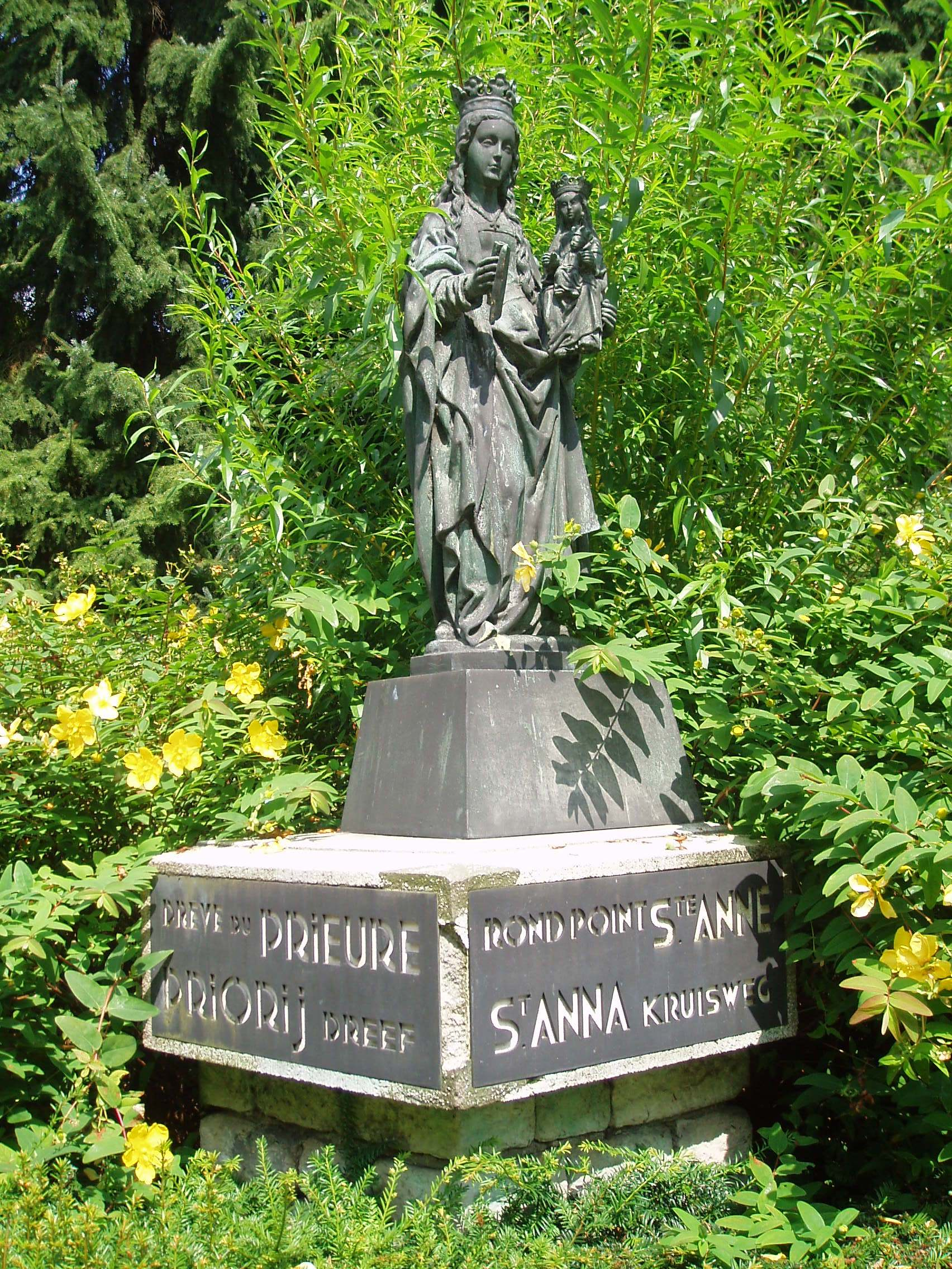 statue Sainte-Anne Auderghem Belgium